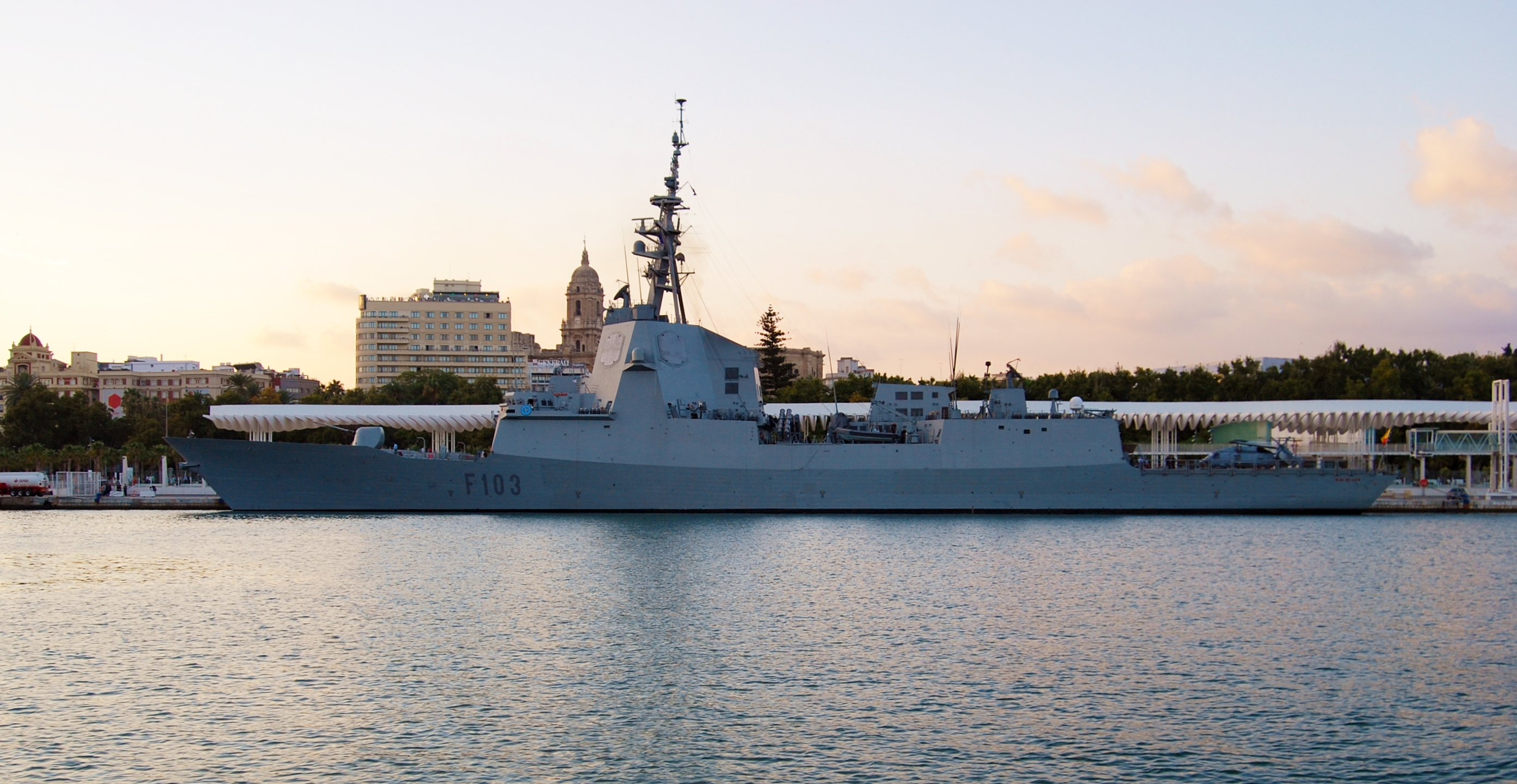 Fragata Blas de Lezo en el puerto de Málaga, 5 de septiembre 2013